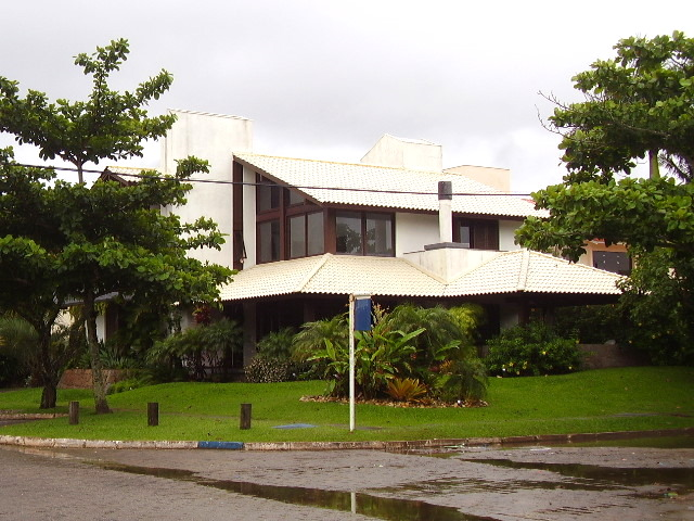 Residencia en Jureré, Florianópolis.